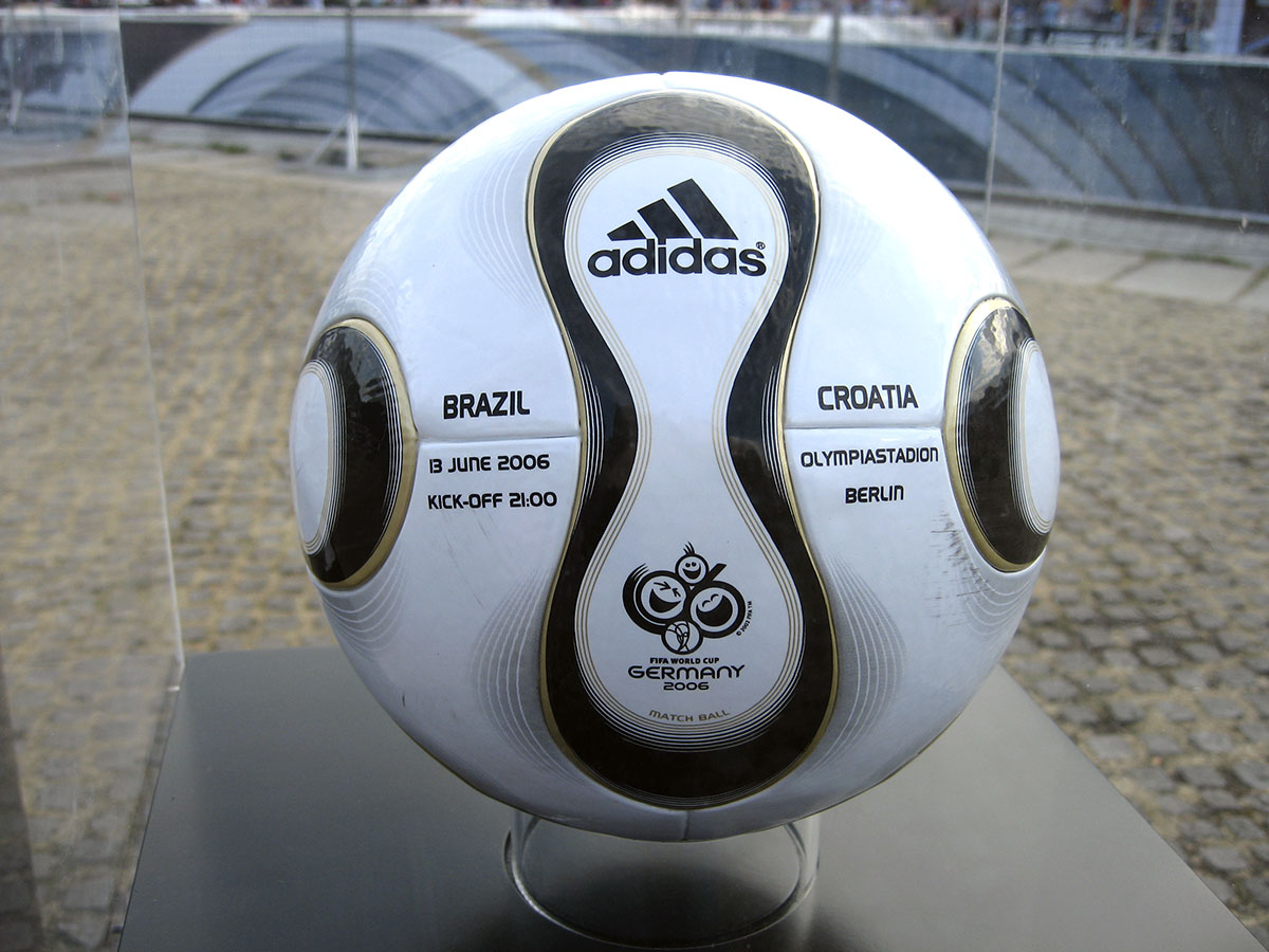 Adidas-Teamgeist-Ball aus der Partie Brasilien - Kroatien (gesehen in der »Adidas World of Football«, Platz der Republik, Berlin)